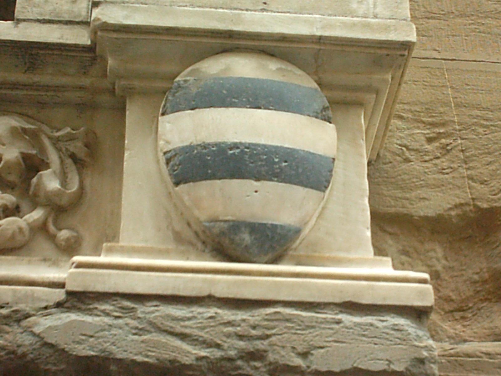 stemma dell'arte dei calzolai nicchia esterna della chiesa di Orsanmichele a Firenze